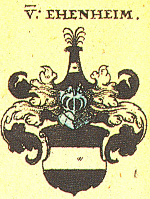 Ritterschaft und Adel in Franken von Ehenheim